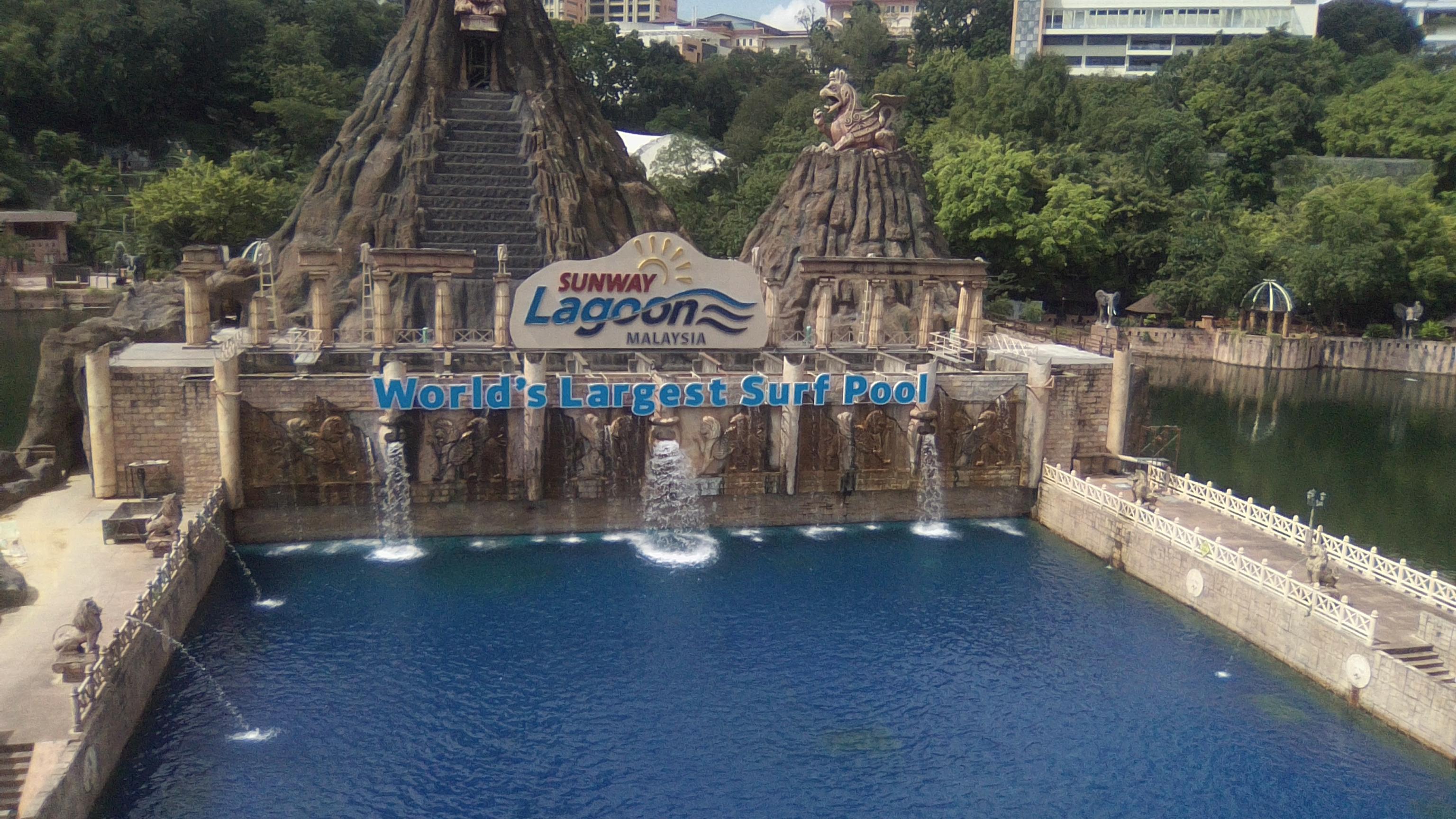 Sunway Lagoon di Subang Jaya,Selangor